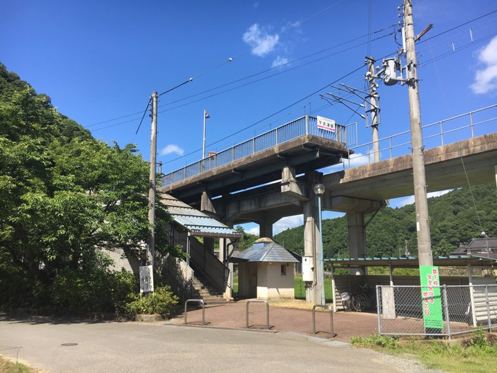 丹鉄下天津駅全景